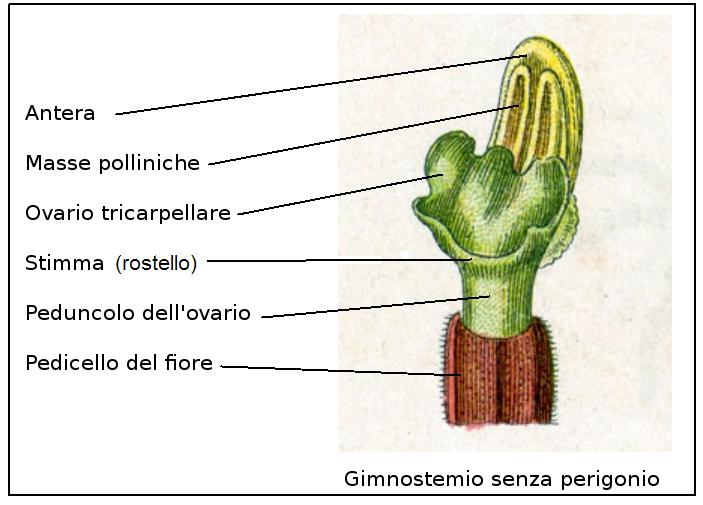 Epipactis helleborine